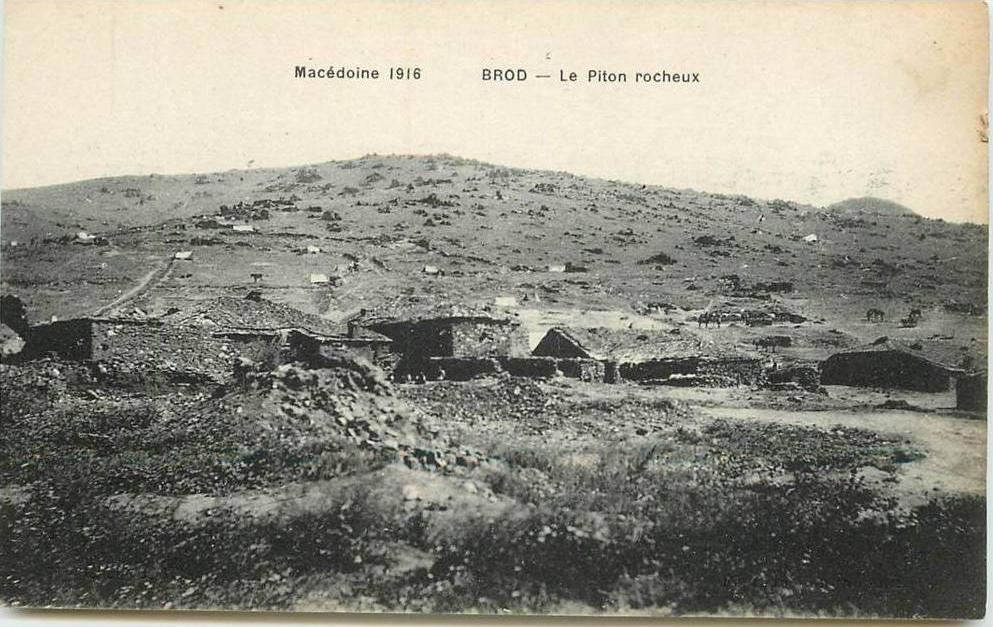 Брод през Първата световна война